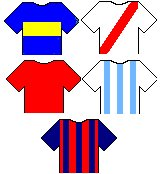 Colores de los cinco grandes equipos de fútbol de Argentina.